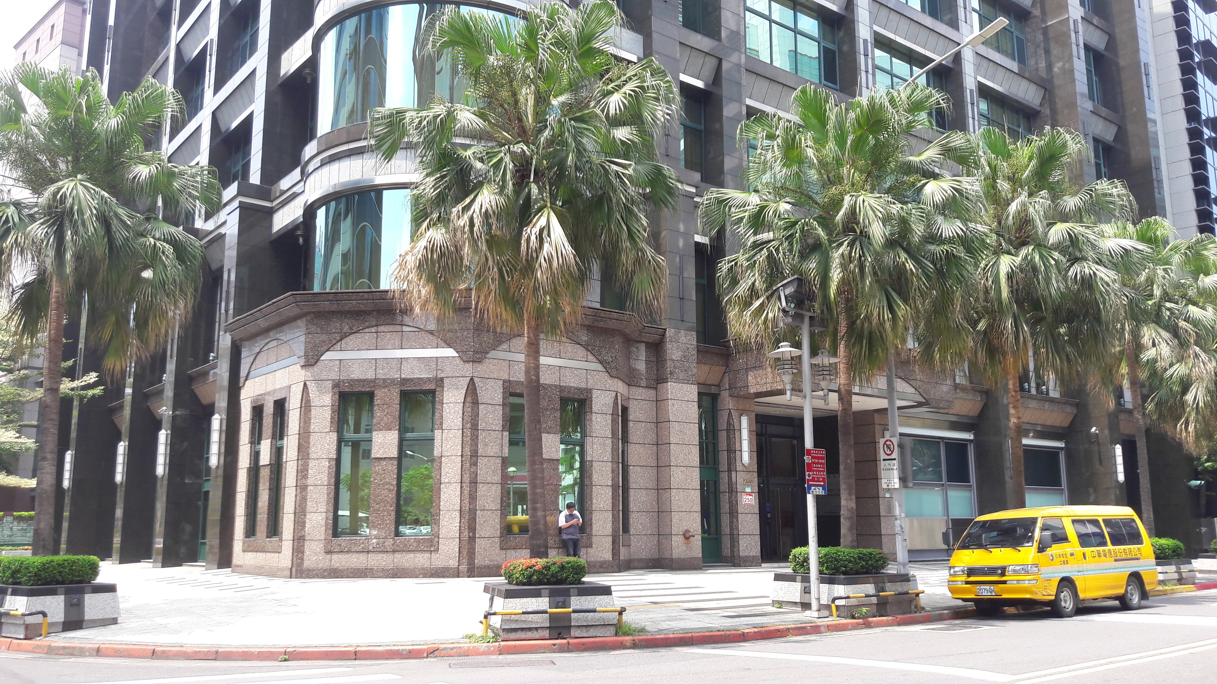 中文（中国大陆）: 是方电讯TPIX机房，设置于台北市内湖区阳光街是方丽源大楼。